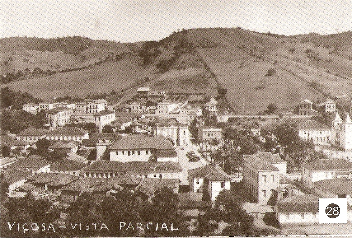 Vista Panorâmica de Viçosa 1932